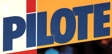 Logotype de Pilote (mensuel), de la couverture du #129, février 1985.